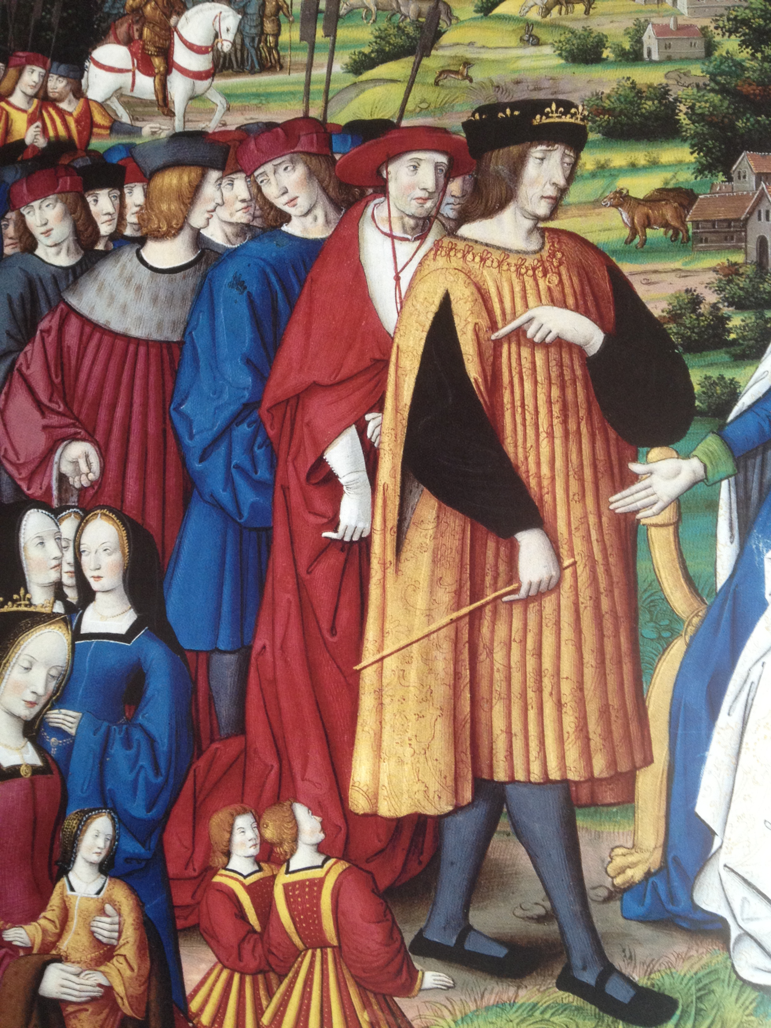 Extrait des "Remèdes de l'une et l'autre" de Plétarque, réalisé à Rouen en 1503 représentant Louis XII suivit du cardinal Georges d'Amboise.